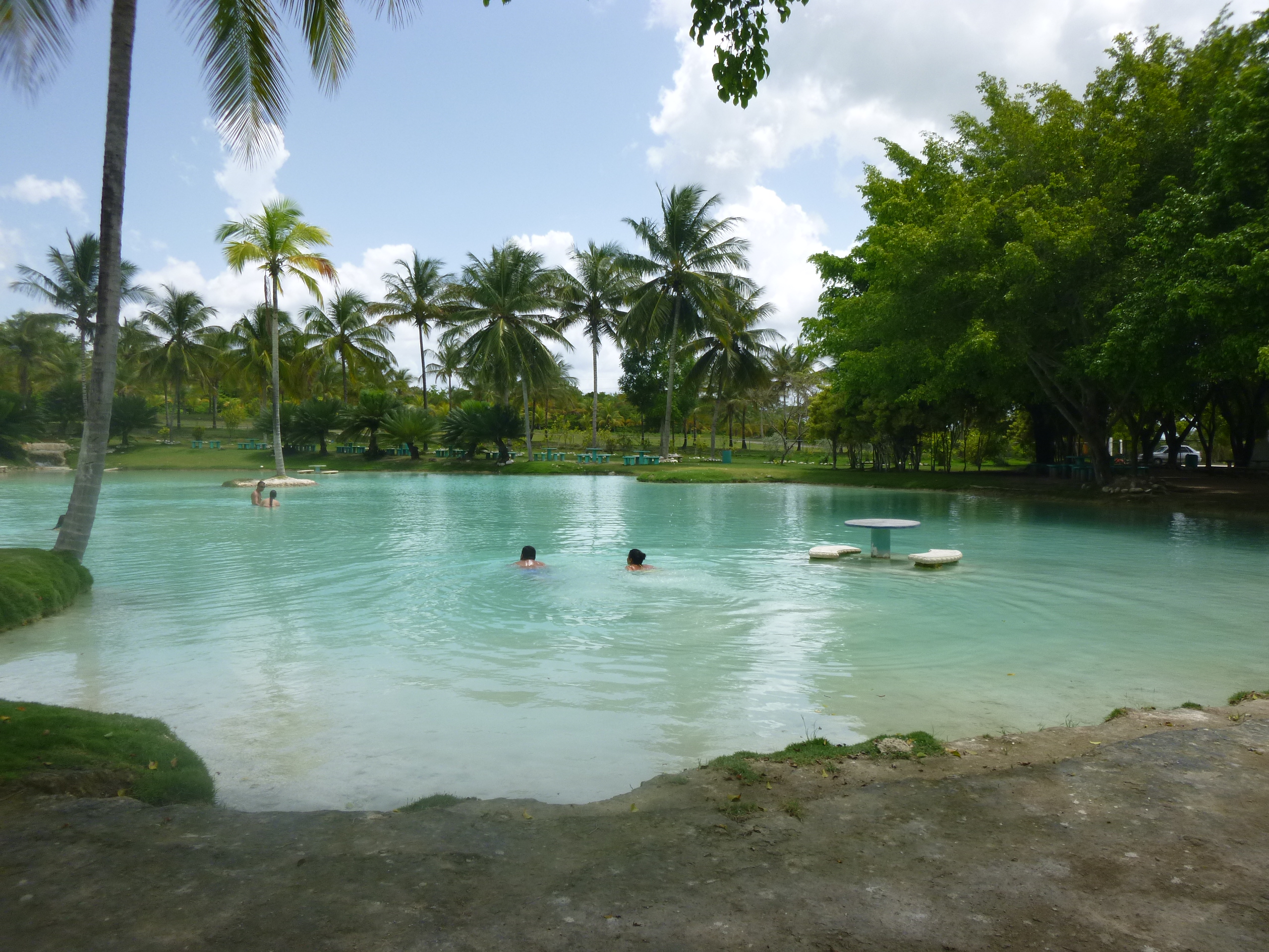 Parque Las Aguas de Moisés, atractivo turístico del estado Sucre en Venezuela